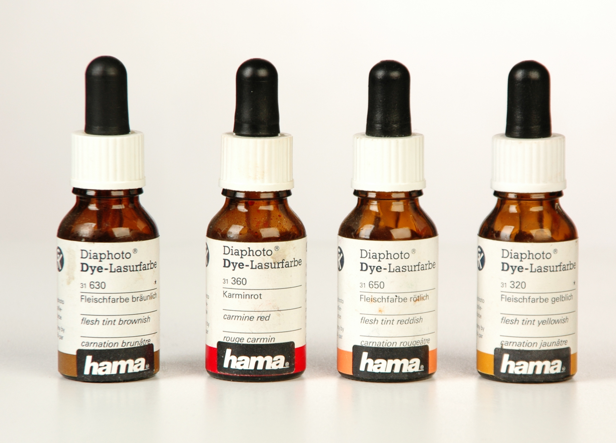 Retuschezubehör für analoge Fotografie. Zum Anmischen einer Farpalette für die Retusche von Farbfotos, ca. 1995